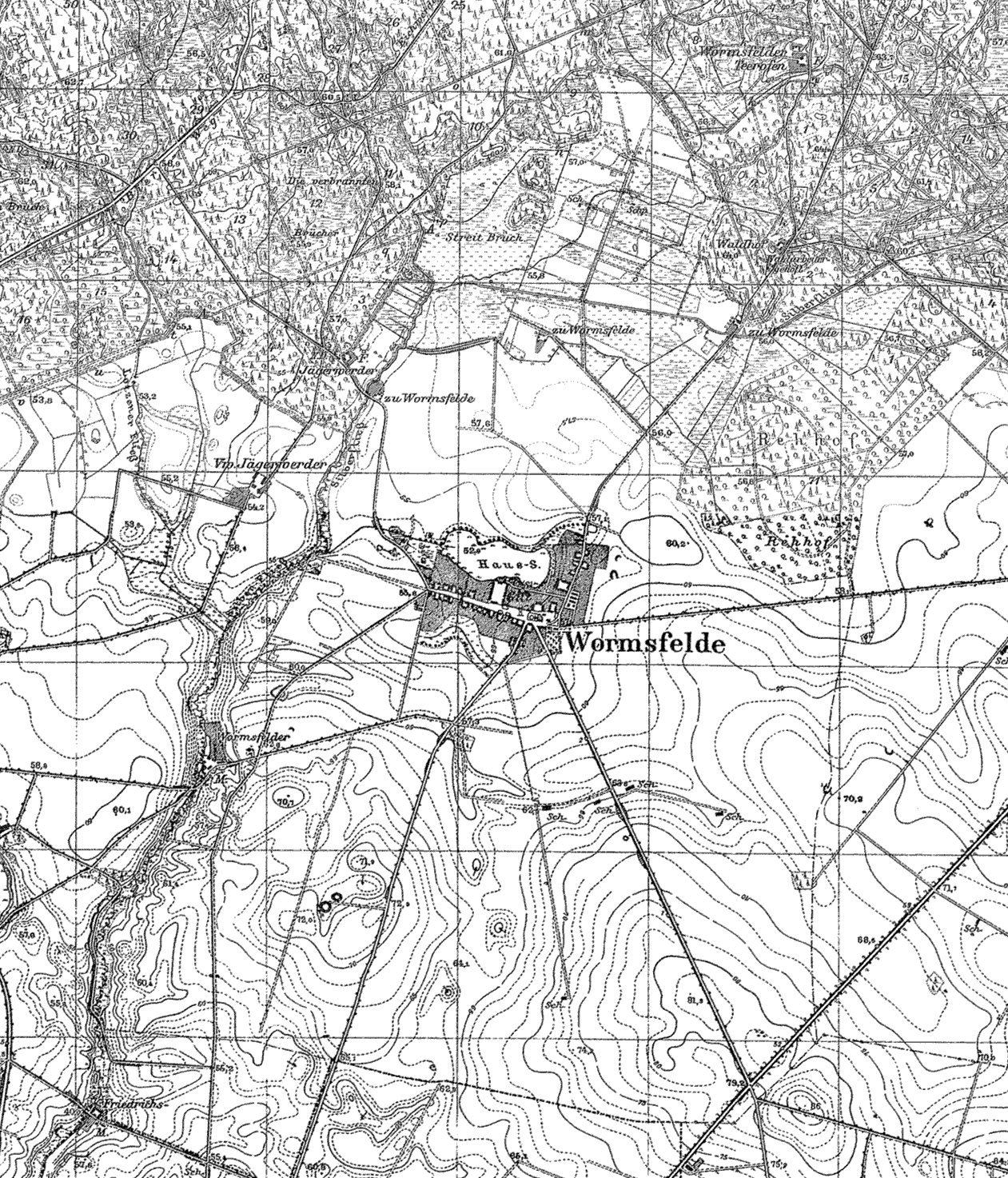 Wojcieszyce / Wormsfelde. Połączone wycinki niemieckich map sztabowych z 1934 i 1936r.